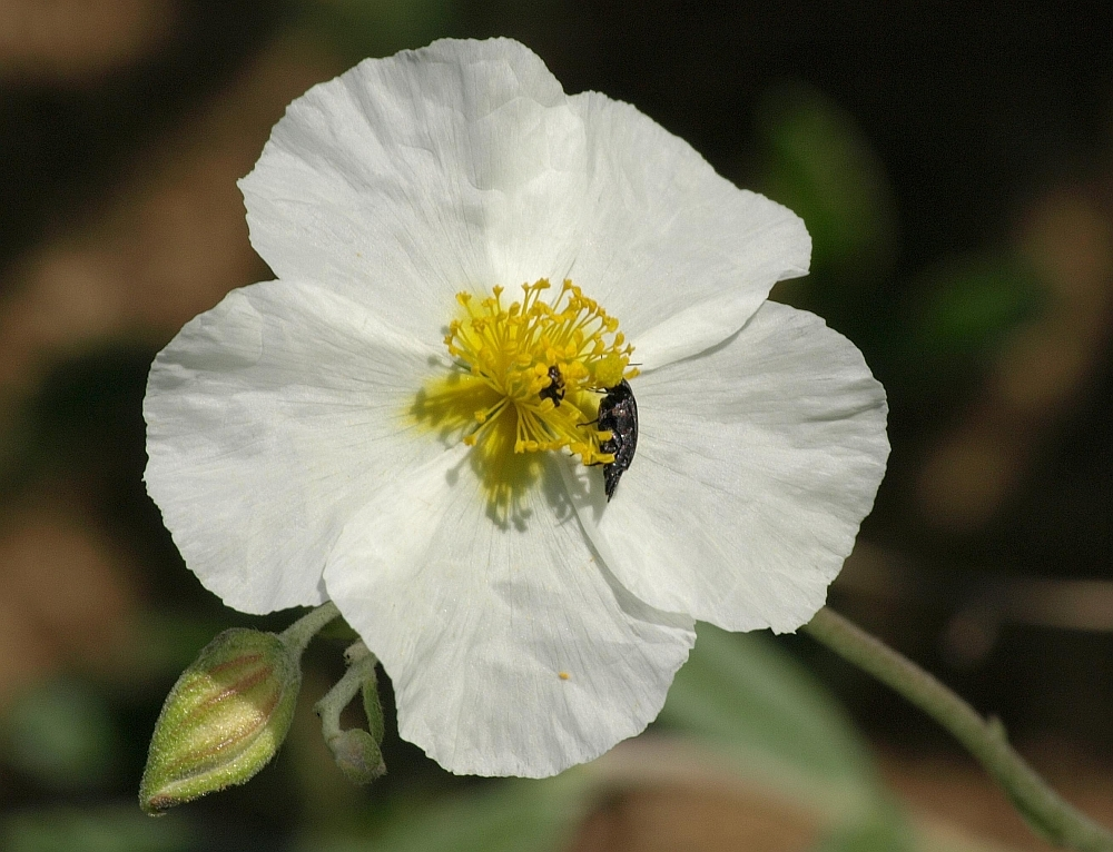 Apenninen-Sonnenröschen, in Rheinhessen aufgenommen